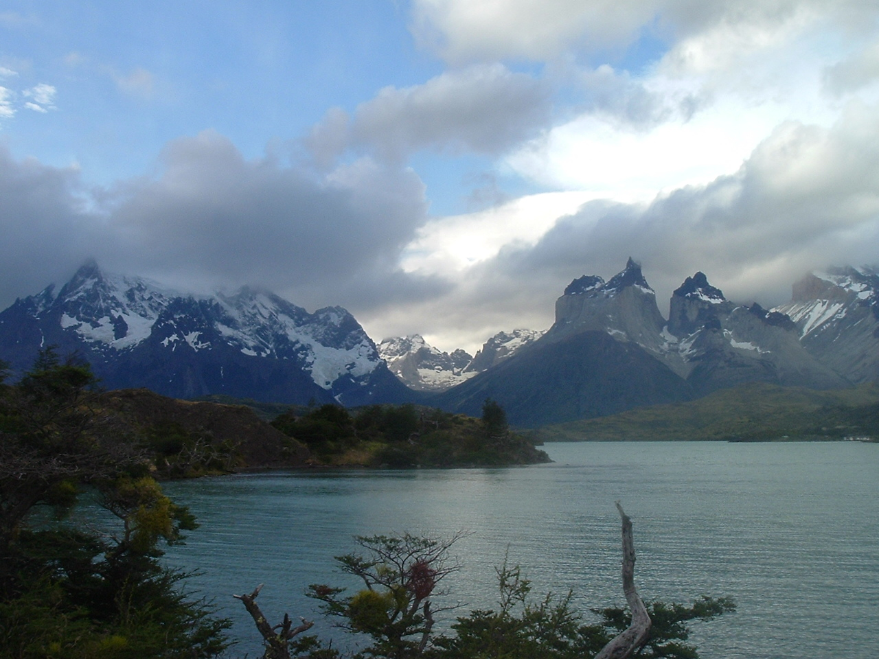 Macizo del Paine y las torres del Paine, al sur de Chile